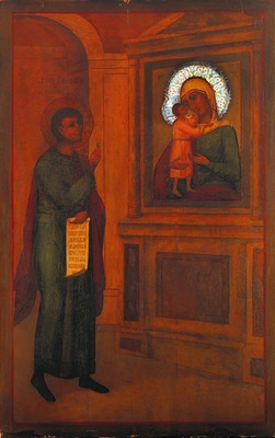 Heilige Bonifatius from Roma (Tarsus)